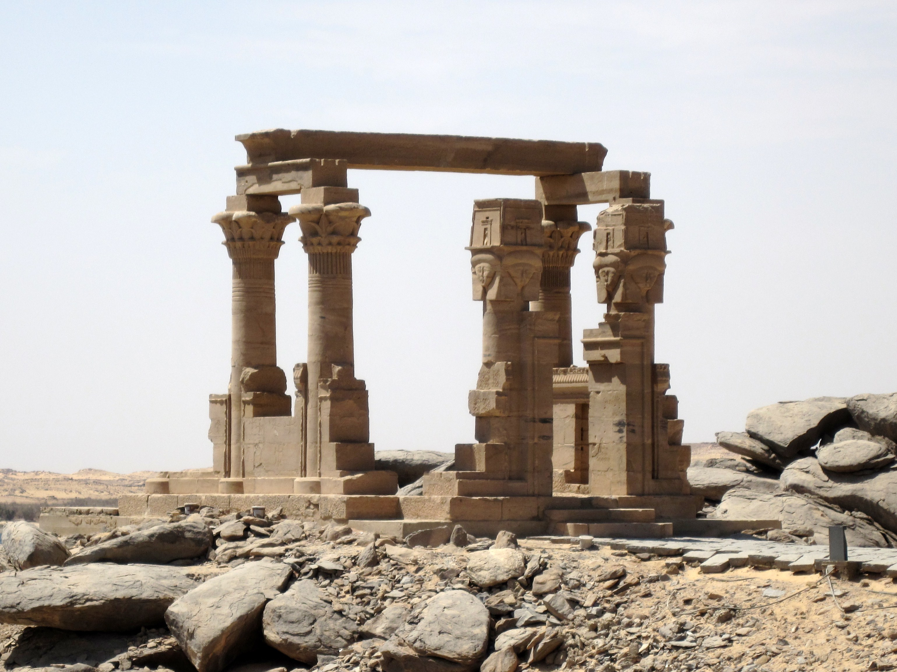 Der Kiosk von Kertassi nahe dem Assuan-Hochdamm, Ägypten